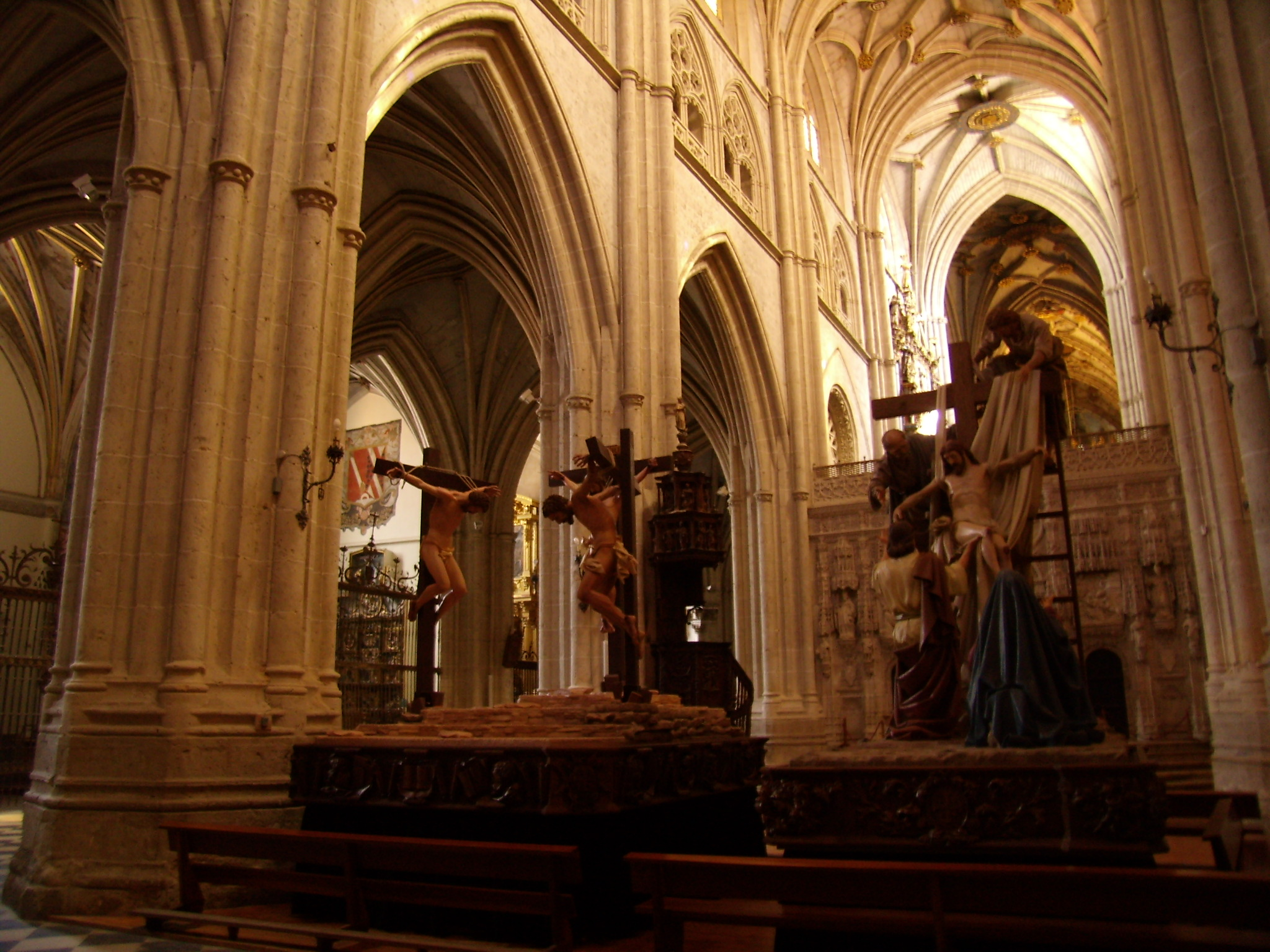 Pasos de la Semana Santa en la Catedral de Palencia